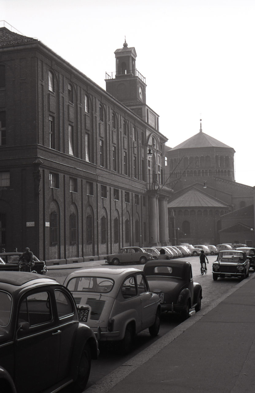 Servizio fotografico : Milano, 1963 / Paolo Monti. - Strisce: 2, Fotogrammi complessivi: 9 : Negativo b/n, gelatina bromuro d'argento/ pellicola ; 35 mm. - ((I fotogrammi hanno una doppia numerazione. . - Sul portanegativi: Leica Ilford Pan F. - Sul dorso del portanegativi Monti specifica: "Vedi anche 100". - Questa striscia non è menzionata nell'agenda citata in fonti e documenti. - Occasione: Pubblicazione: "Il Novecento in architettura". - Fonte: Agenda di Paolo Monti: Foto Leica 1 / 1-51 verde, 1-110 nera (1958-1963), presso Archivio Paolo Monti